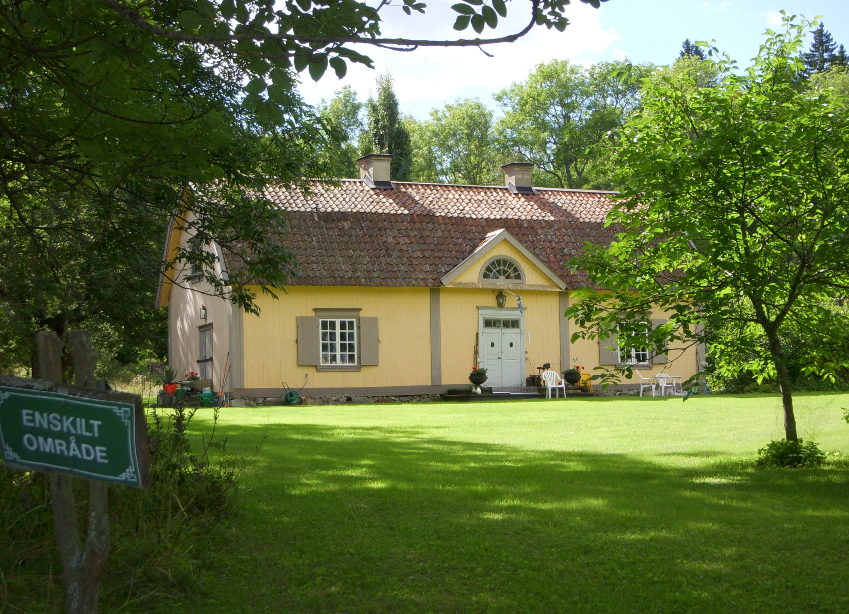 Bornsjöns naturreserevat, Skårby